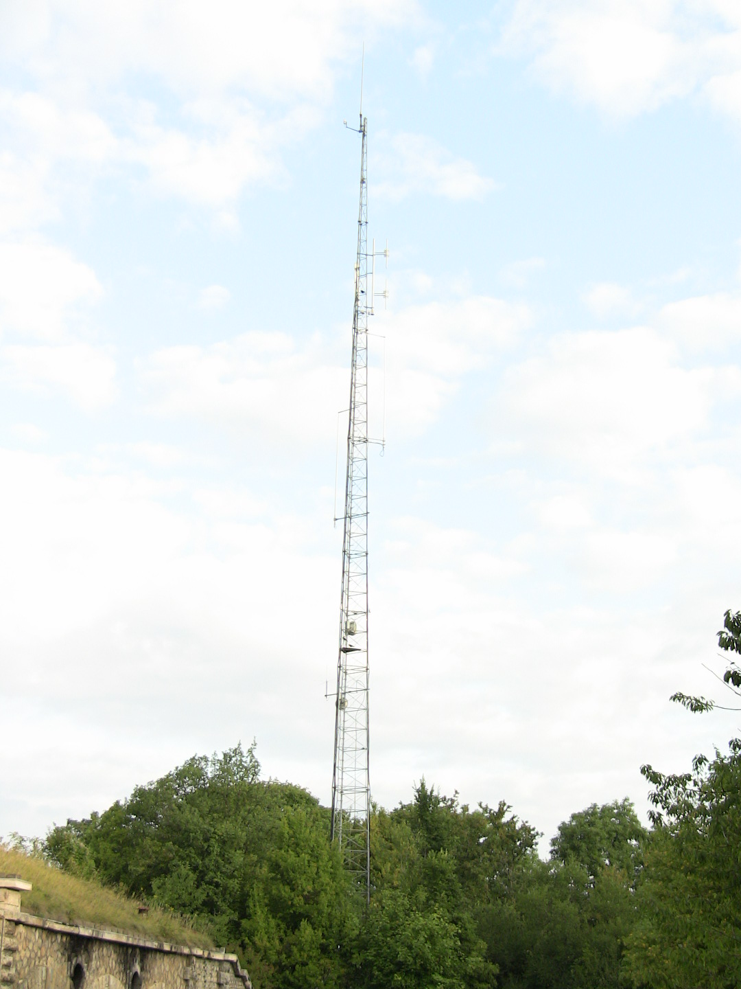 Antenne du Fort de Planoise, à Besançon (Doubs, France).